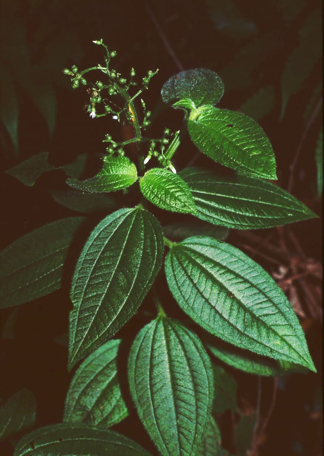 Aciotis rubricaulis, Schwarzmundgewächse (Melastomataceae) - Costa Rica: Prov. Puntarenas, PN Piedras Blancas, Bosque Esquinas bei La Gamba